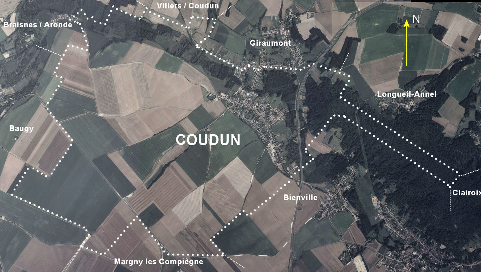 Territoire de Coudun